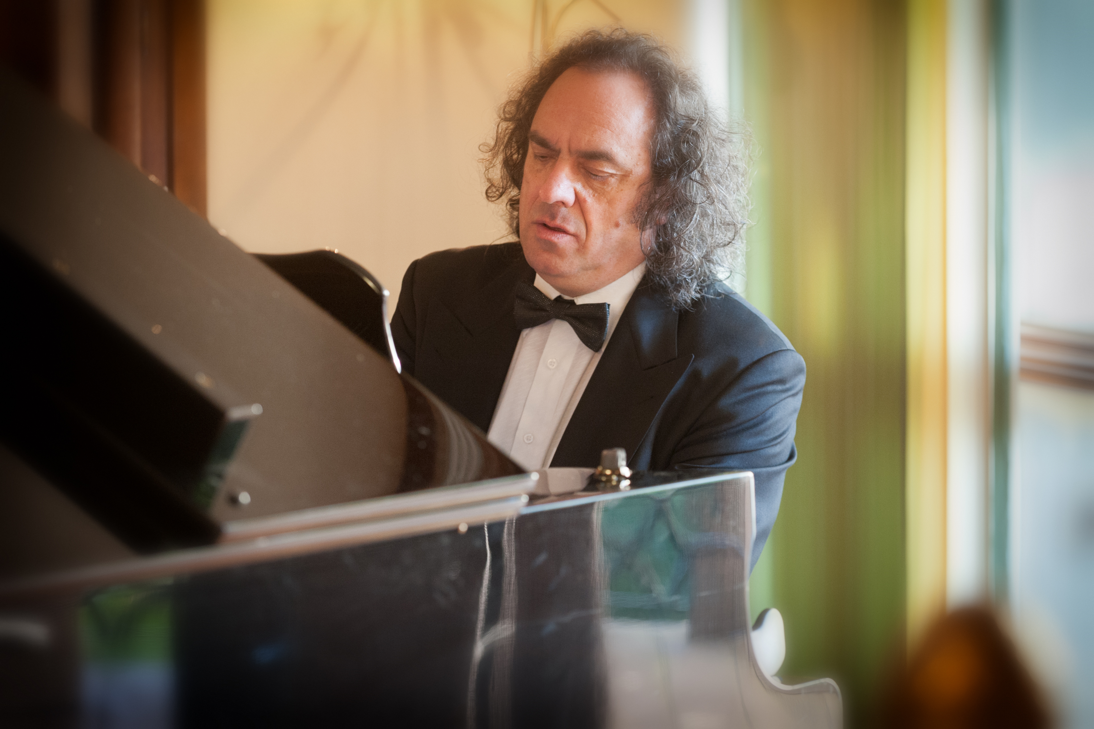 Der argentische Pianist und Komponist am Flügel